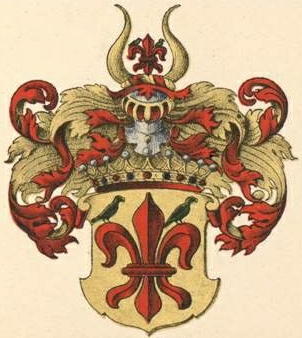 Elmpti suguvõsa krahvivapp